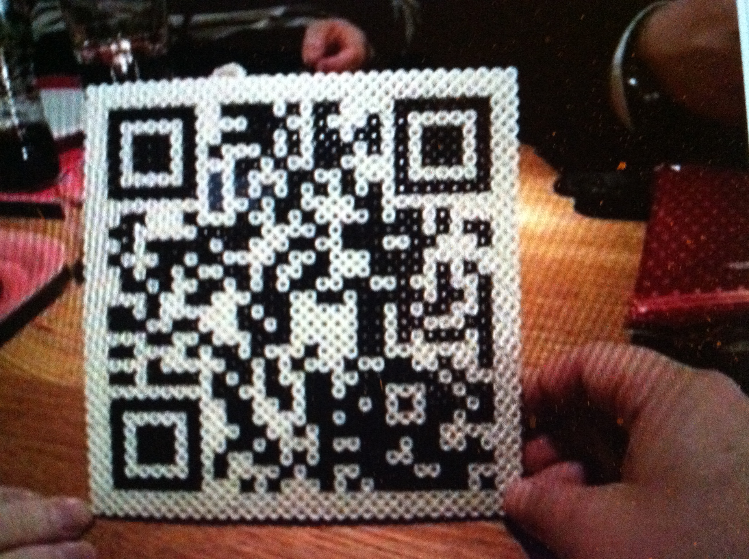 Pårlplatteversion av QRpediakoden som leder till artikeln om pärlplatts. Pärlat och struket av anvädare:LittleGun som en inflyttningspresent till Wikimedia Sveriges kontor mars 2013